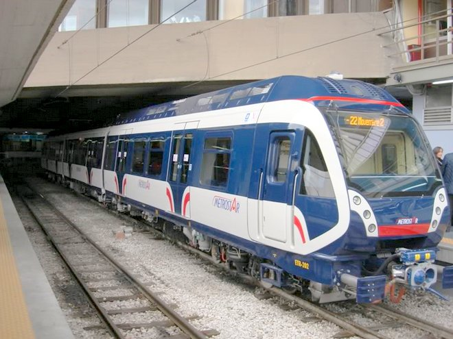 metrostar